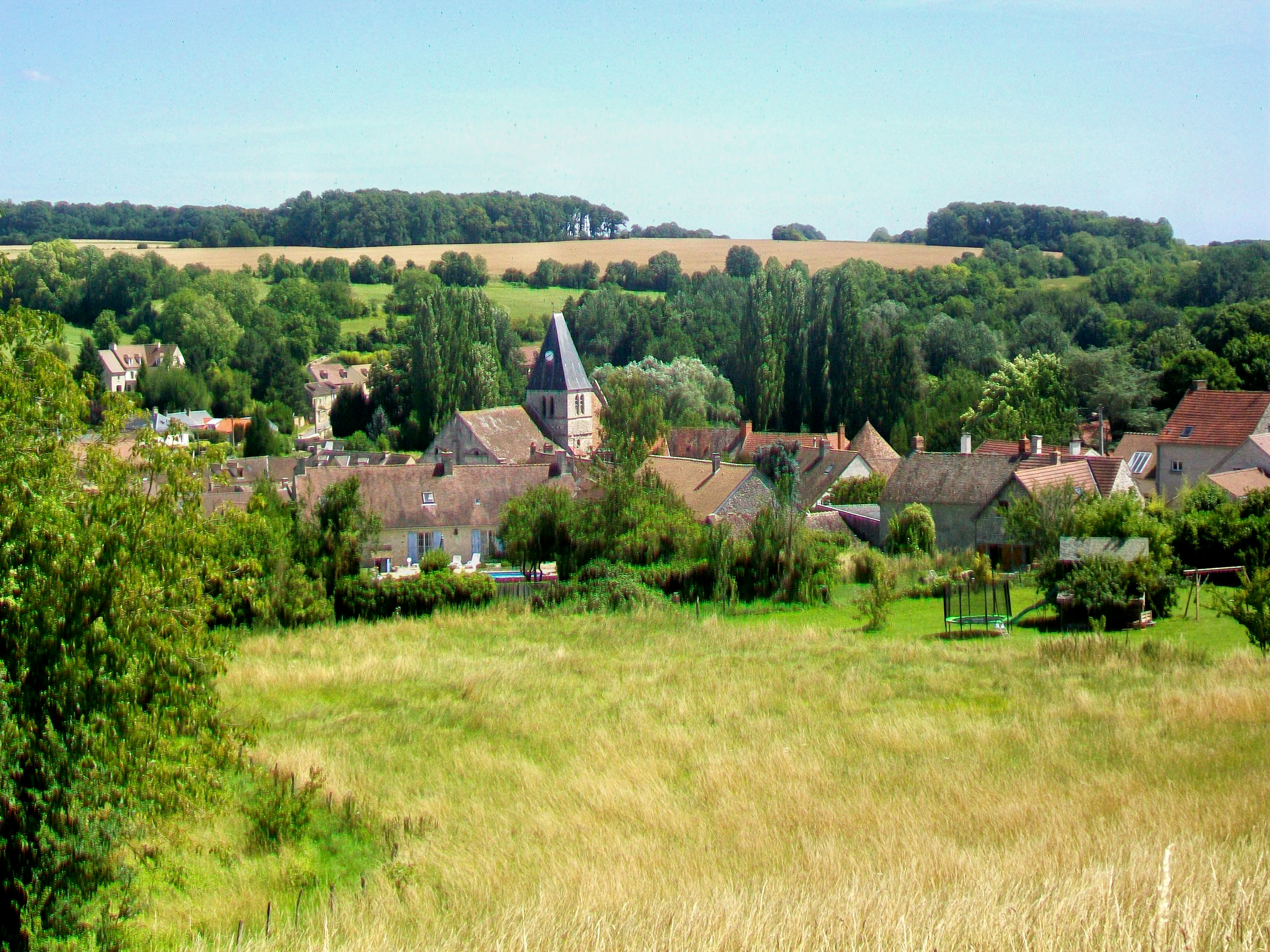 Vue sur le village depuis les environs du cimetière.